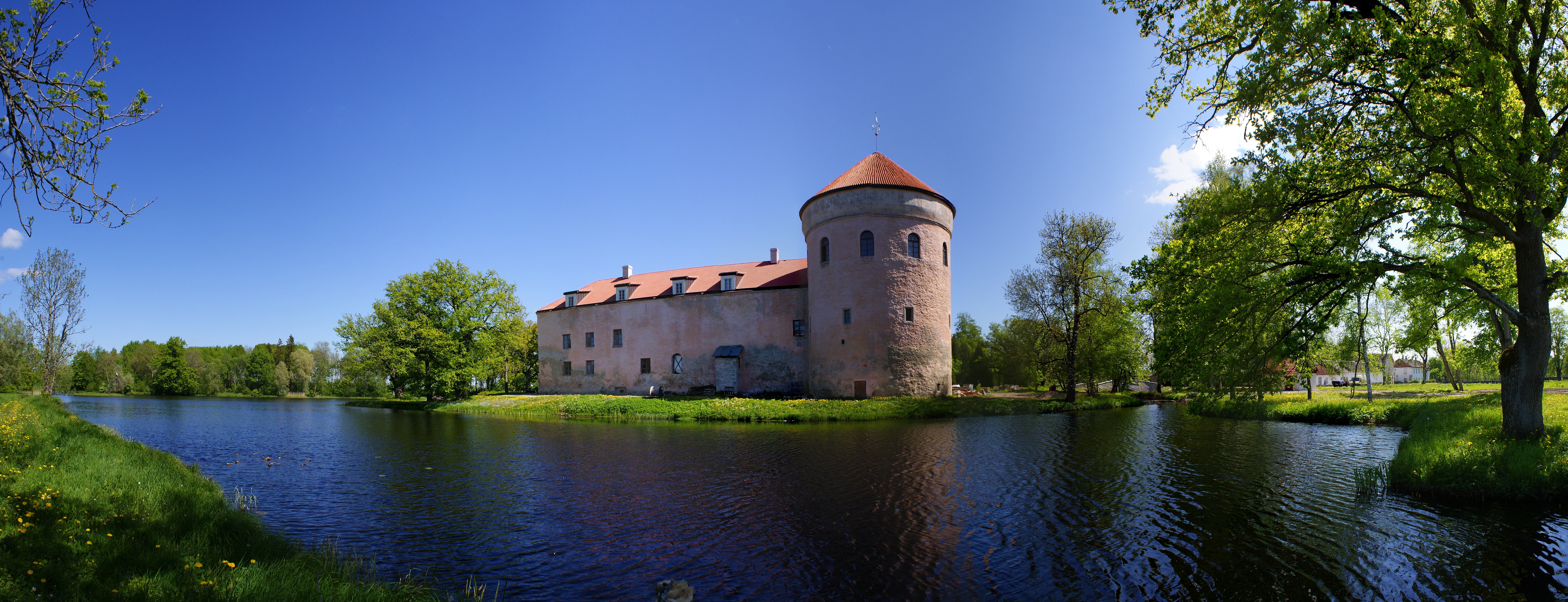 Koluvere linnus vallikraaviga